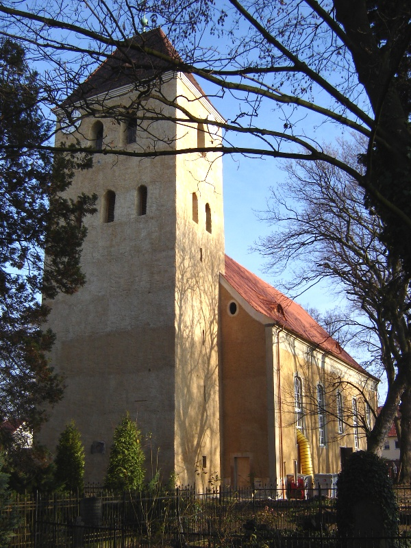 Laurentiuskirche Magdeburg-Olvenstedt (Westansicht)